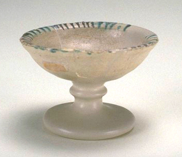 Coppa medievale dipinta in verde ramina . Faenza XIV secolo